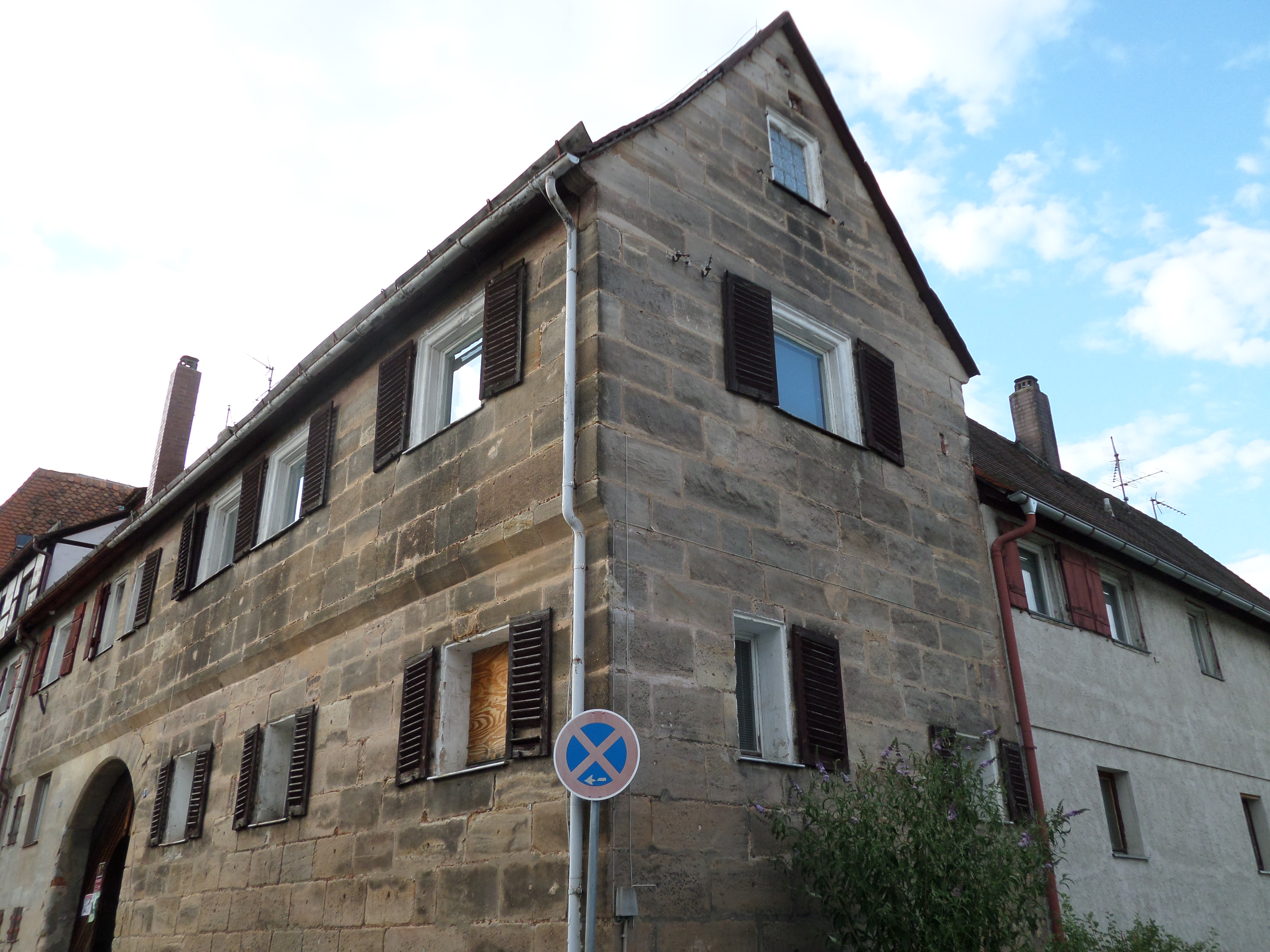 Schloßgasse 1-7 - Ehemaliges Herrenhaus - massiv mit vorkragendem Obergeschoss, im Kern zweite Hälfte 16. Jahrhundert, ausgebaut 17. bis 20. Jahrhundert (Schlossgasse 1); Neuer Bau, zweigeschossiger Sandsteinbau zweite Hälfte 16. Jahrhundert bis 20. Jahrhundert (Schlossgasse 3/5); sogenannter Hinterbau, Voiten- oder Gärtnerhaus, Fachwerk, nach 1555 bis 20. Jahrhundert, mit eingeschossigem Anbau; Scheune, Sandsteinquaderbau mit Steilsatteldach, wohl 19. Jahrhundert, mit baulich anschließendem Nebengebäude; Reste der Schlossmauer, Sandstein, 18. Jahrhundert - D-5-74-154-26